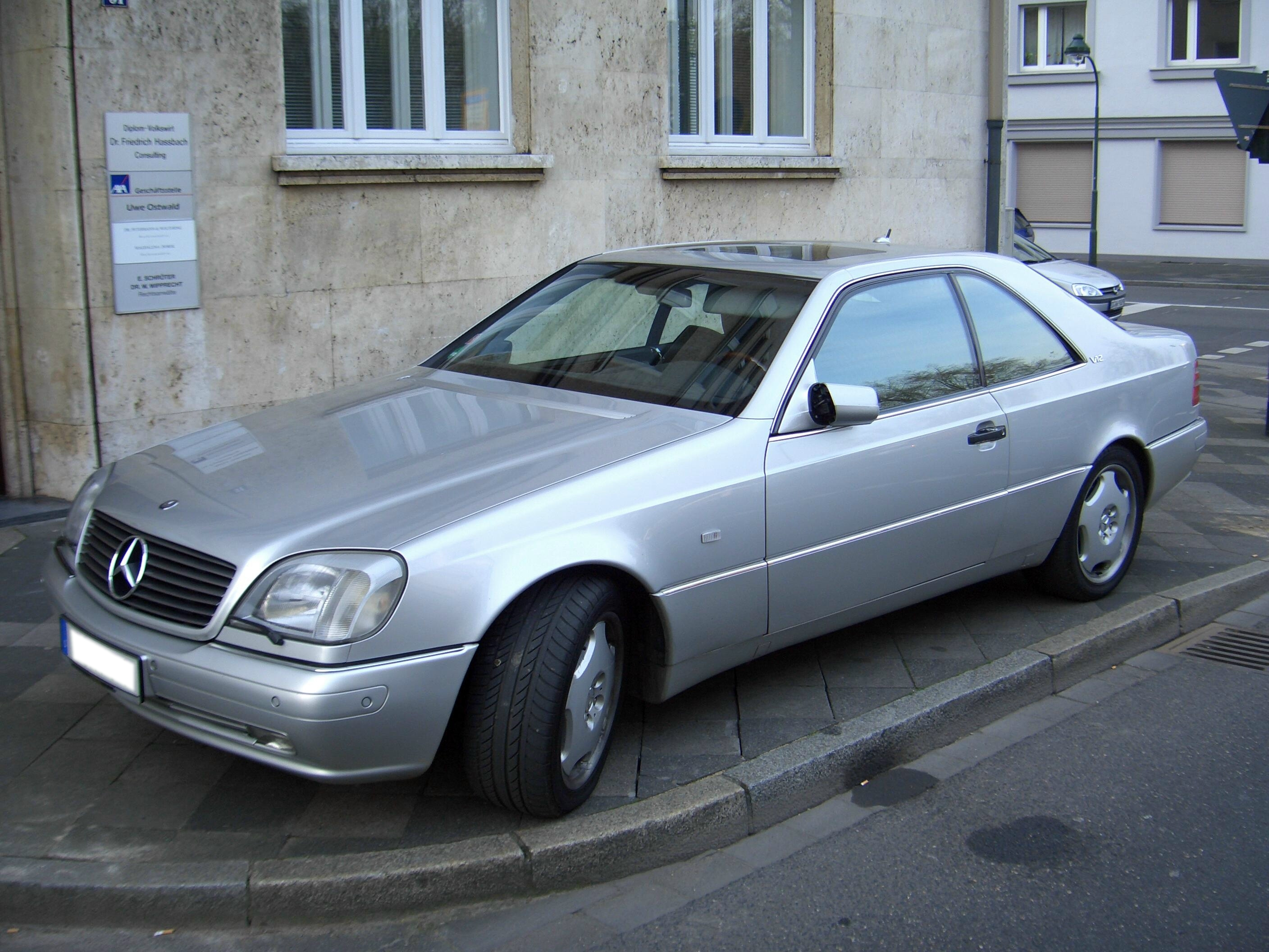 Mercedes-Benz CL 600, series C140 1991-1998, seen in Duesseldorf, Germany